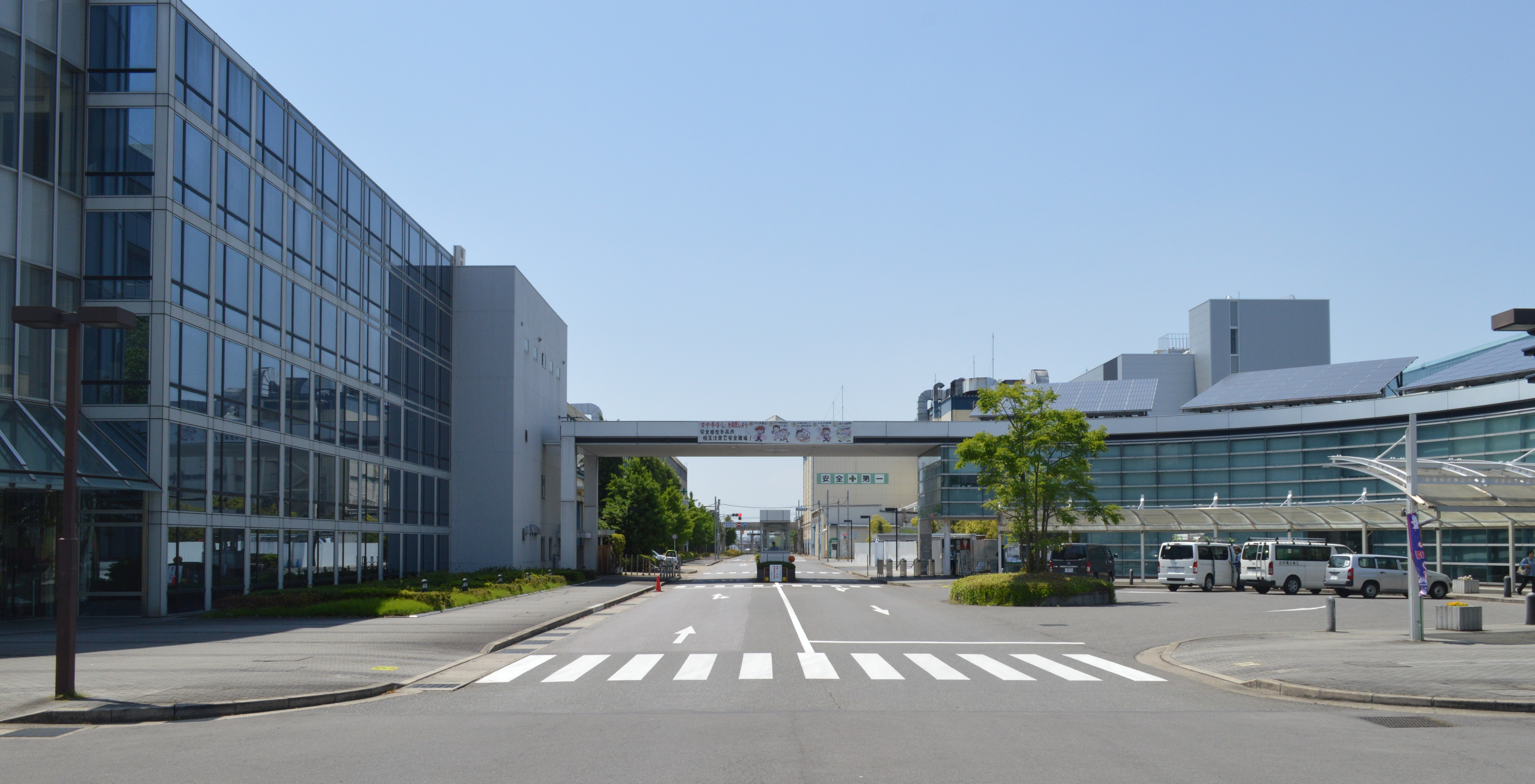 トヨタ車体富士松工場正門、愛知県刈谷市